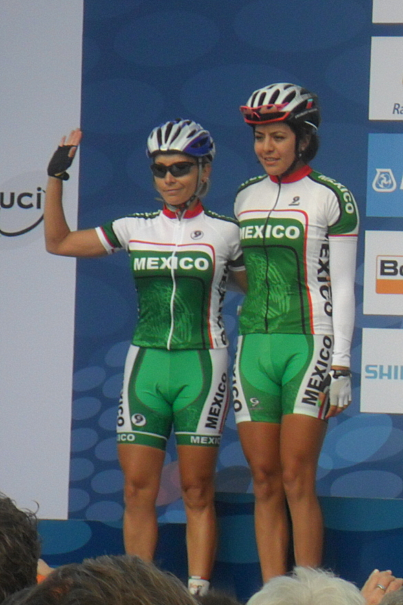 Ploegenpresentatie Mexico voor de start van het Wereldkampioenschap 2012 in Valkenburg, Nederland.